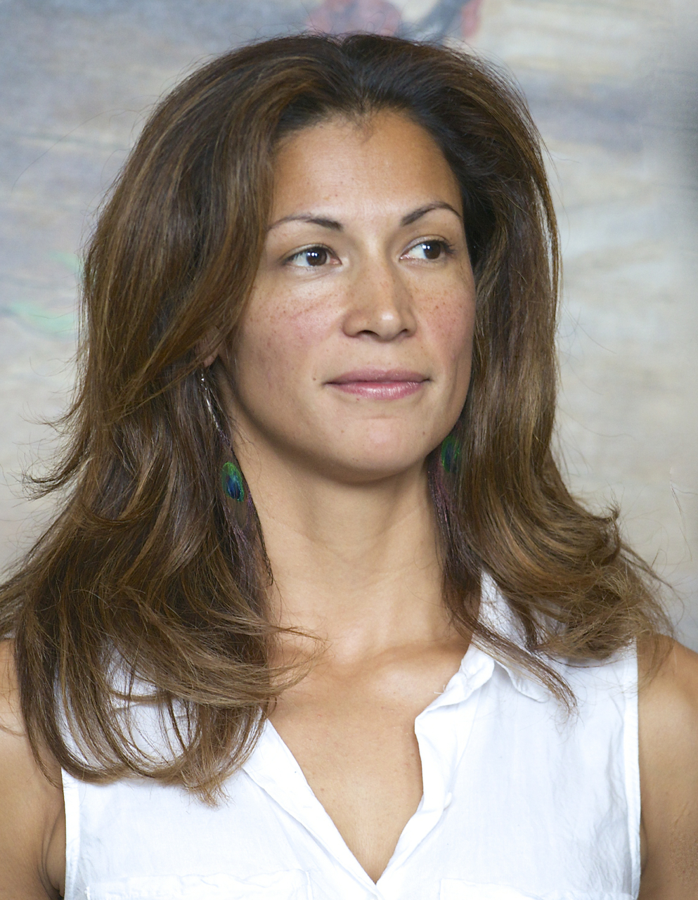 Malin Arvidsson under Dramatens höstsamling 2014.